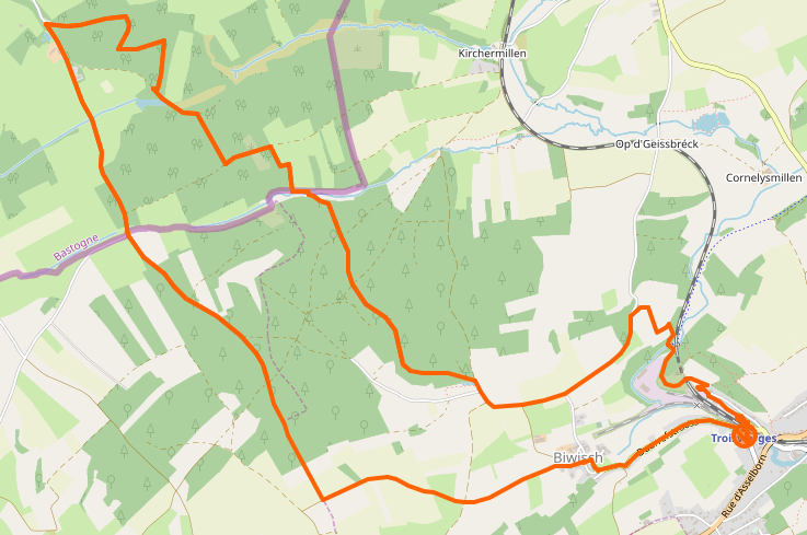 Tracé du Sentier pédestre « Sentier des passeurs », circuit nord « frontière »